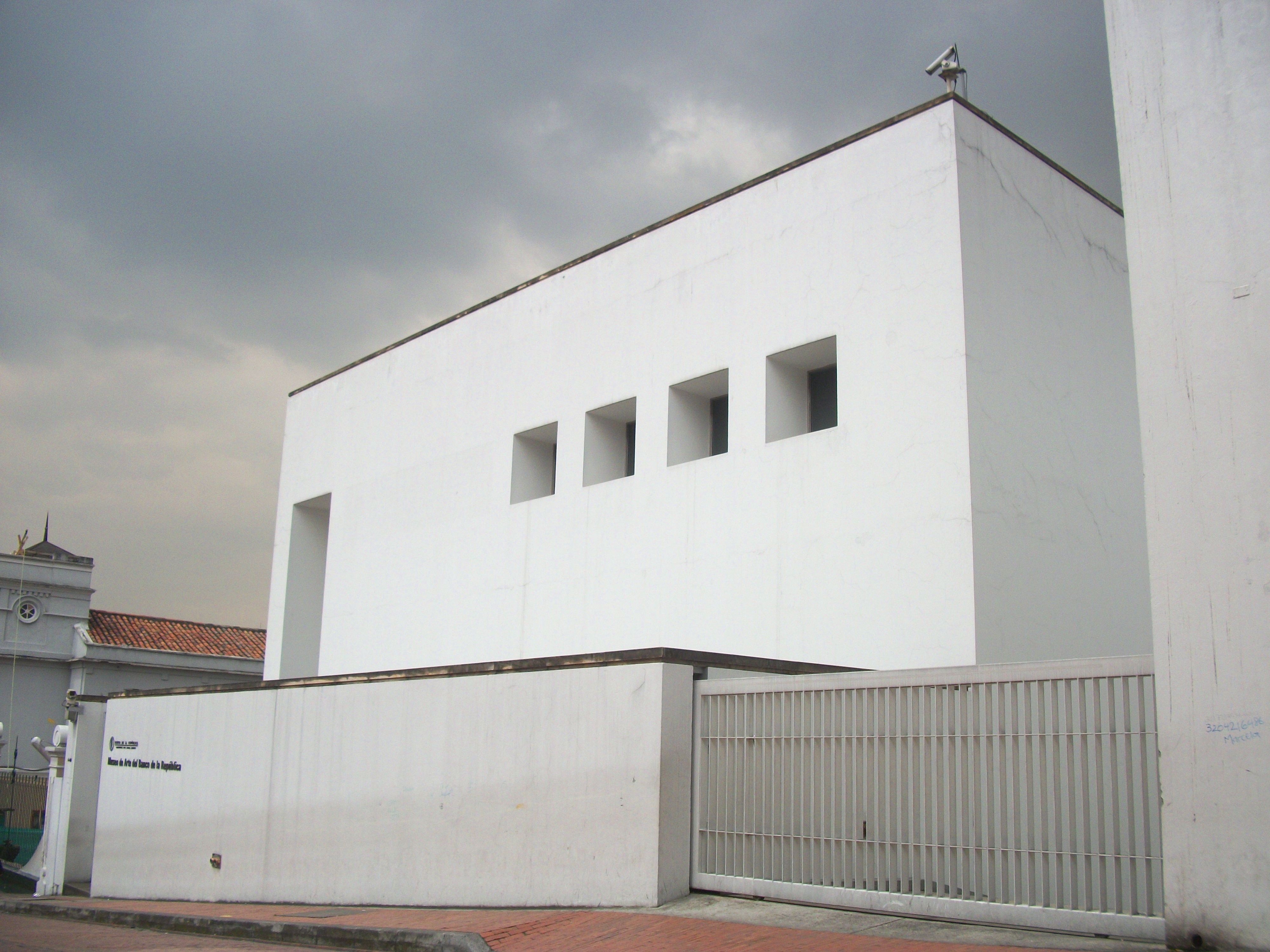 Edificio Salas de Exposiciones Temporales del Banco de la República Bogotá Manzana de la cultura, calle 10 con carrera Cuarta.